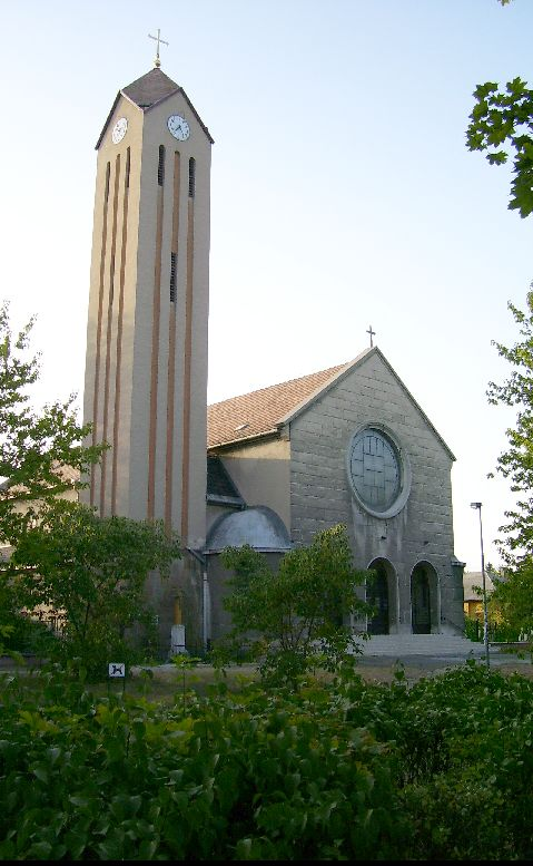 Az Újpest-kertvárosi Szent István római katolikus plébániatemplom (épült 1942 és 1946 között neoromán stílusban) délkeleti irányból fotózva 2007. júliusában. A teplom címe: 1046 Budapest, Rákóczi tér 2-4. Saját fotó.